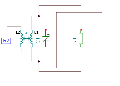 Induktiivne sidestus puhtaktiivse takistuse tarbeks. Tehtud TinaSpice'i abiga